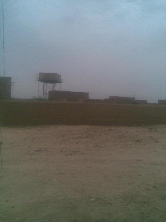 الكندرية